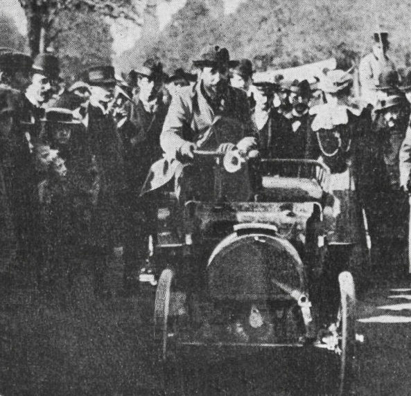 Marcel Renault, troisième de Paris-Rambouillet 1899 sur voiturette Renault - Le Sport universel illustré du 28 octobre 1899 , p.688